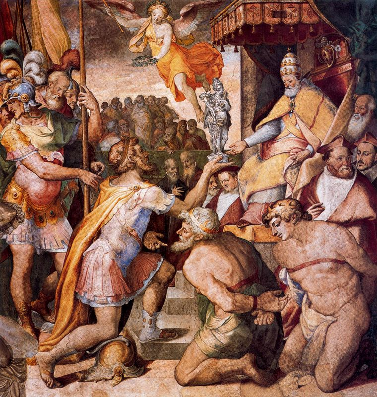 El emperador Otón I reintegra los Estados de la Iglesia al papa Agapito IItitle QS:P1476,es:"El emperador Otón I reintegra los Estados de la Iglesia al papa Agapito II"